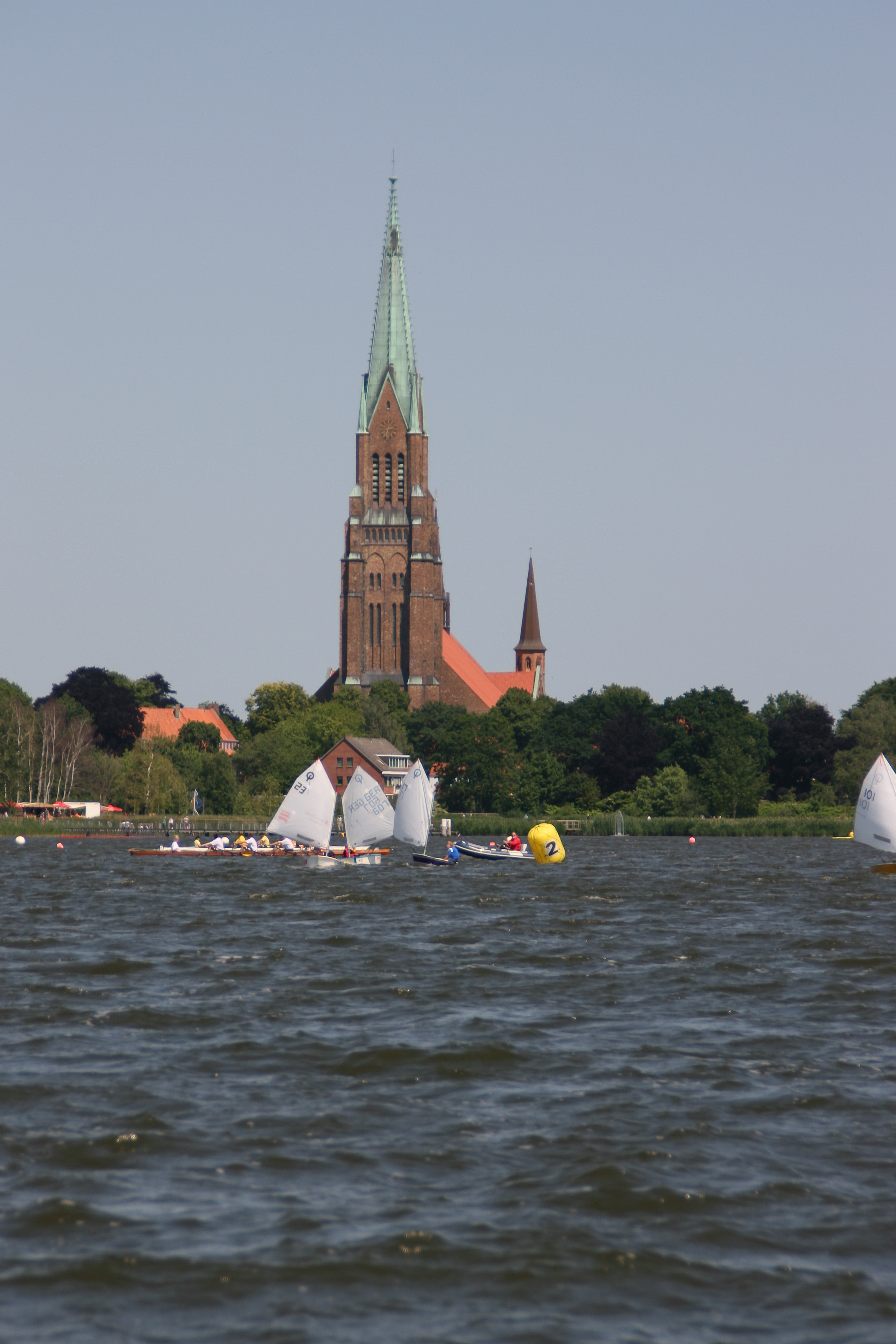 Blick über die Schlei auf dem Schleswiger Dom